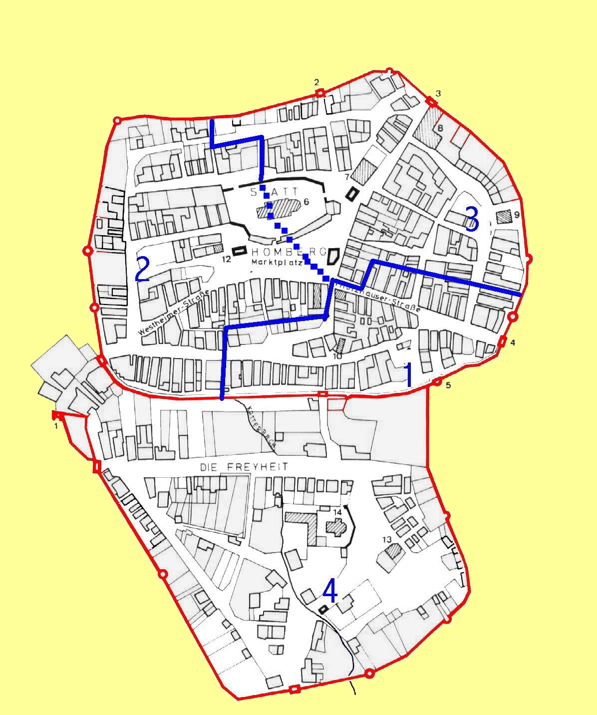 Die vier Geburden von Homberg